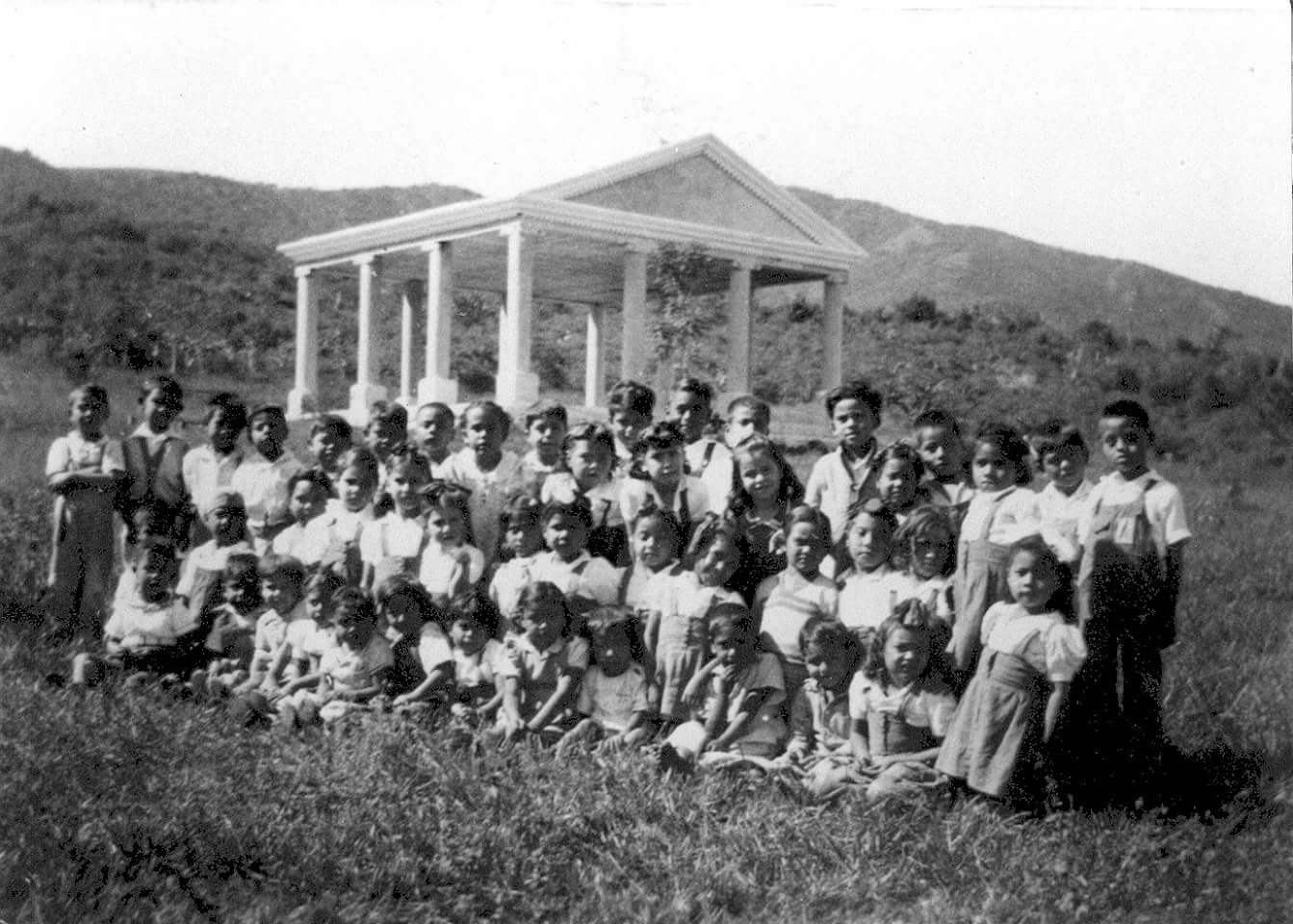 Templo de Minerva de Salamá en 1910.